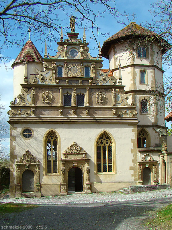 Schlosskapelle von Schloss Liebenstein bei Neckarwestheim